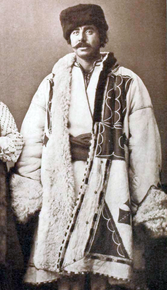 VILAYET DE TOUNA (danube) PLANCHE XI: Femme Bulgare de Roustchouk Bulgare chrétien de Widdin Bulgare musulman de Widdin